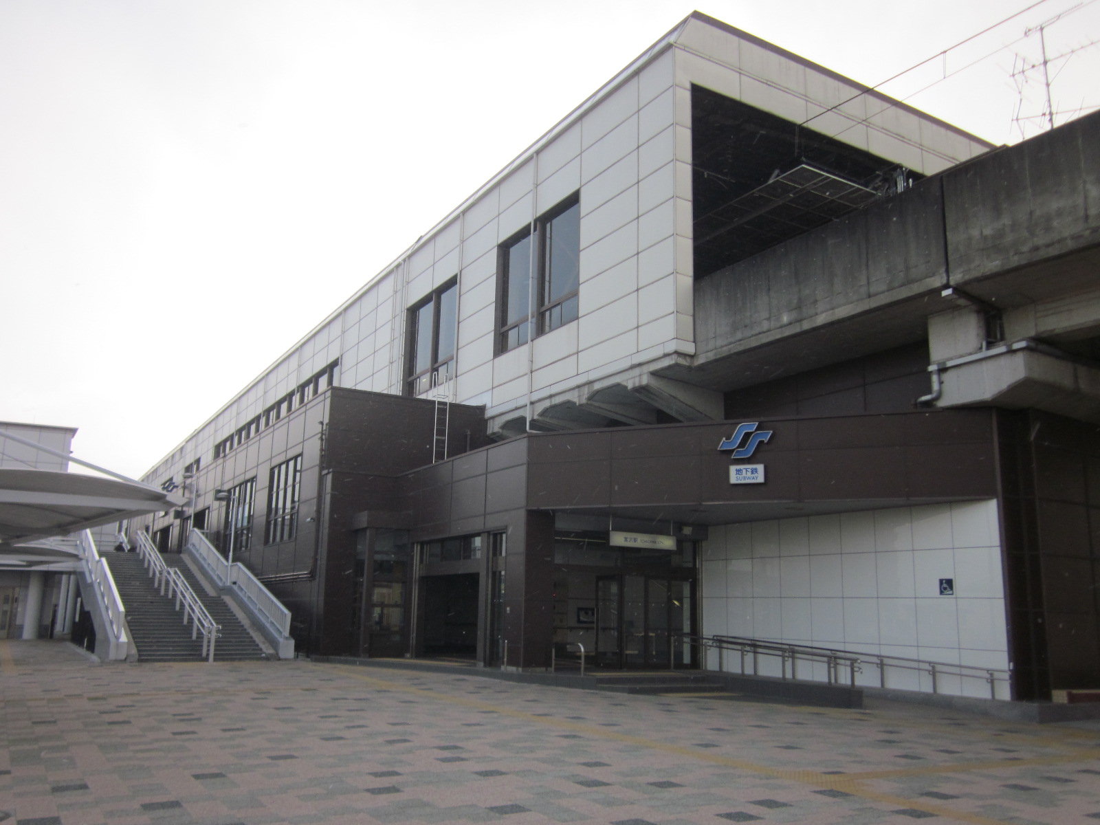 宮城県仙台市太白区富沢駅。